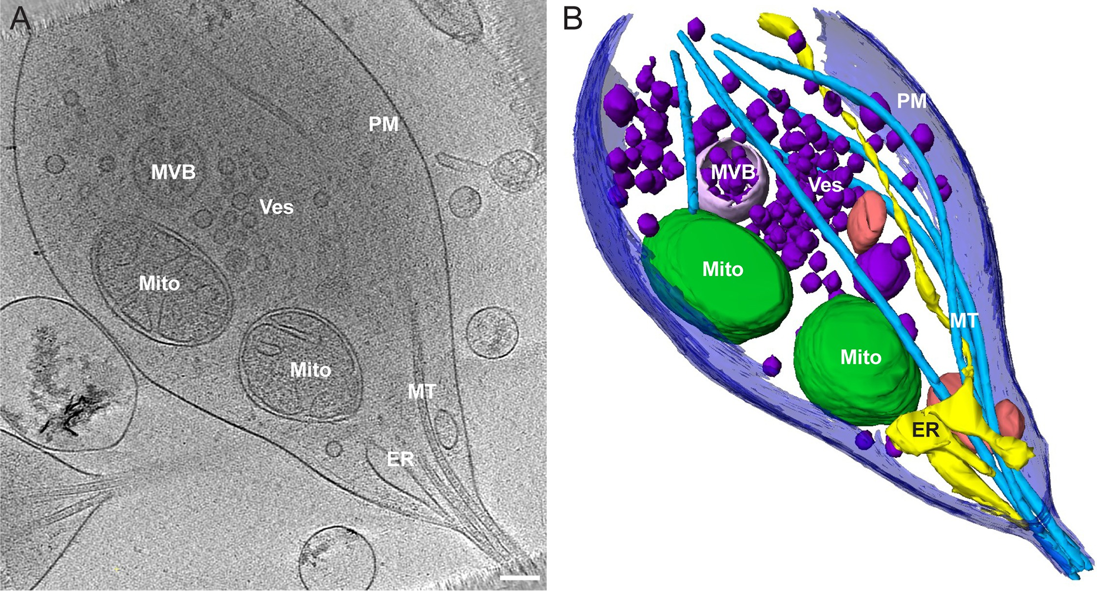 Fig. 2. Reconstrucción tomográfica de una varicosidad presináptica típica y segmento axónico adyacente. (A) Un corte 2D de la reconstrucción tomográfica que muestra la distribución de los orgánulos en la varicosidad (Mito = mitocondria). (B) Representación segmentada de todo el volumen del tomograma 3D que se muestra en (A) revelando el tamaño relativo y la distribución espacial del entorno de orgánulos en el segmento de varices y axones. PM Membrana plasmática (azul oscuro), MT microtúbulos (azul claro), membrana externa mitocondrial ("Mito", verde oscuro), ER retículo endoplásmico (amarillo), Ves vesícula (púrpura oscuro), MVB cuerpo multivesicular (púrpura claro), compartimento unido a la membrana no identificado (rosa). Hipocampo de rata E18. Barra de escala = 200 nm.